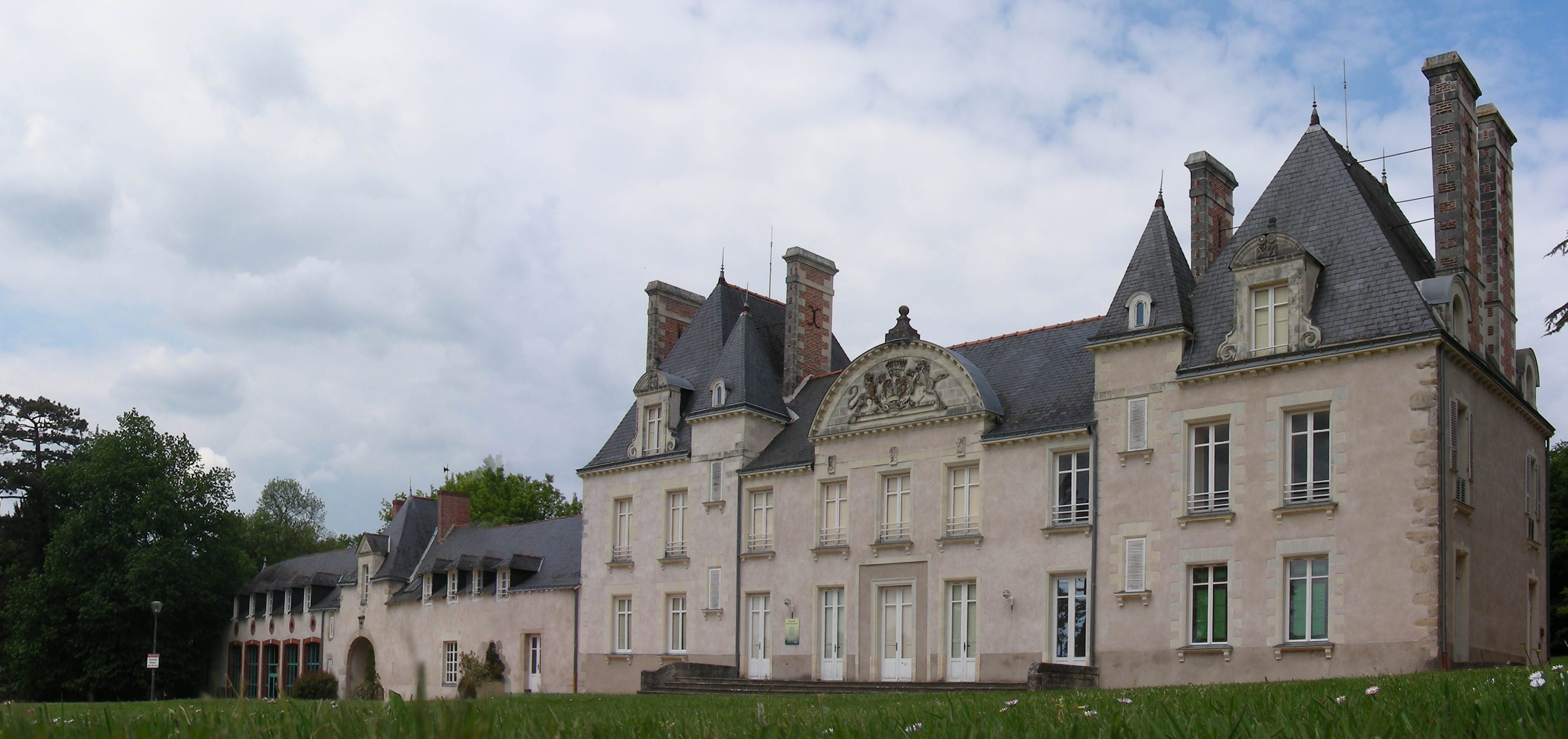 Parc de la Gournerie Château Façade